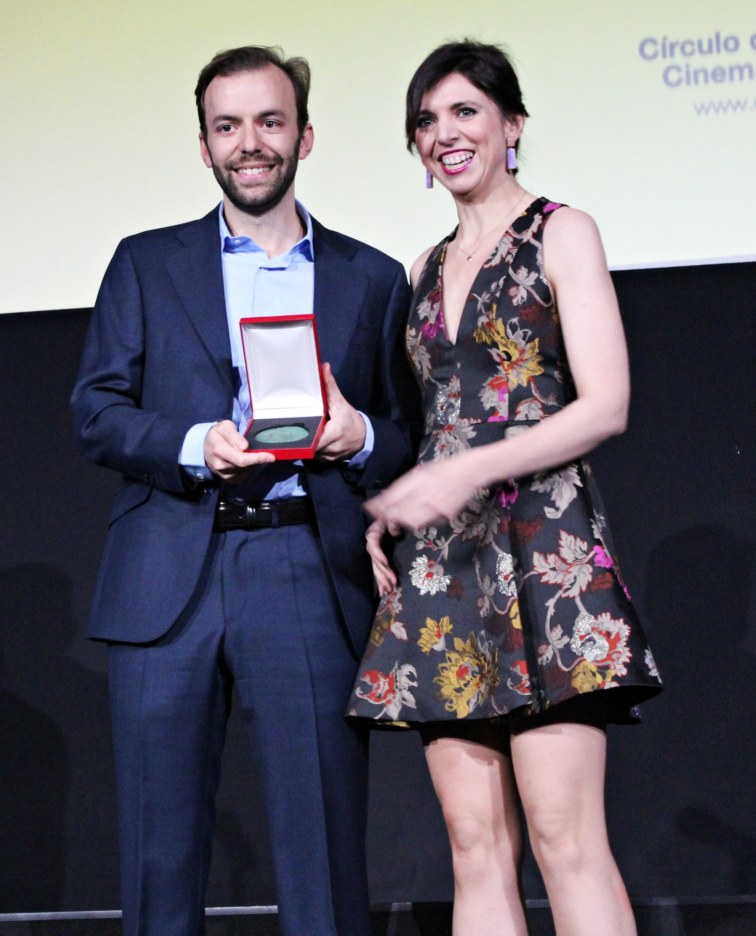 El director español Guillermo de Oliveira y la productora Luisa Cowell reciben la Medalla del Círculo de Escritores Cinematográficos al mejor largometraje documental en la 74 edición de dichos premios.